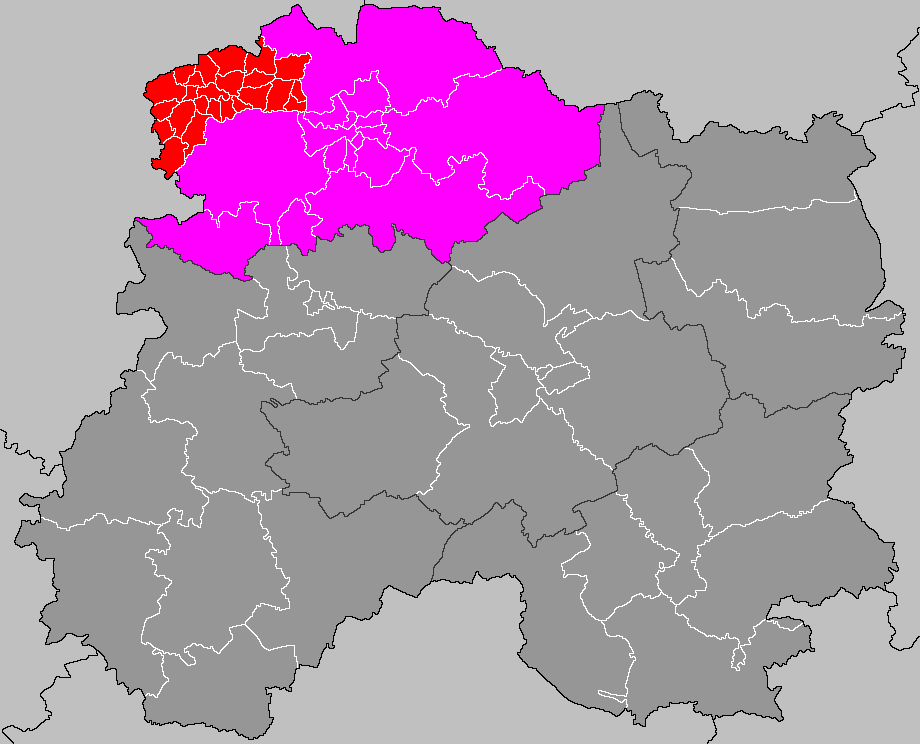 Localisation du canton de Fismes